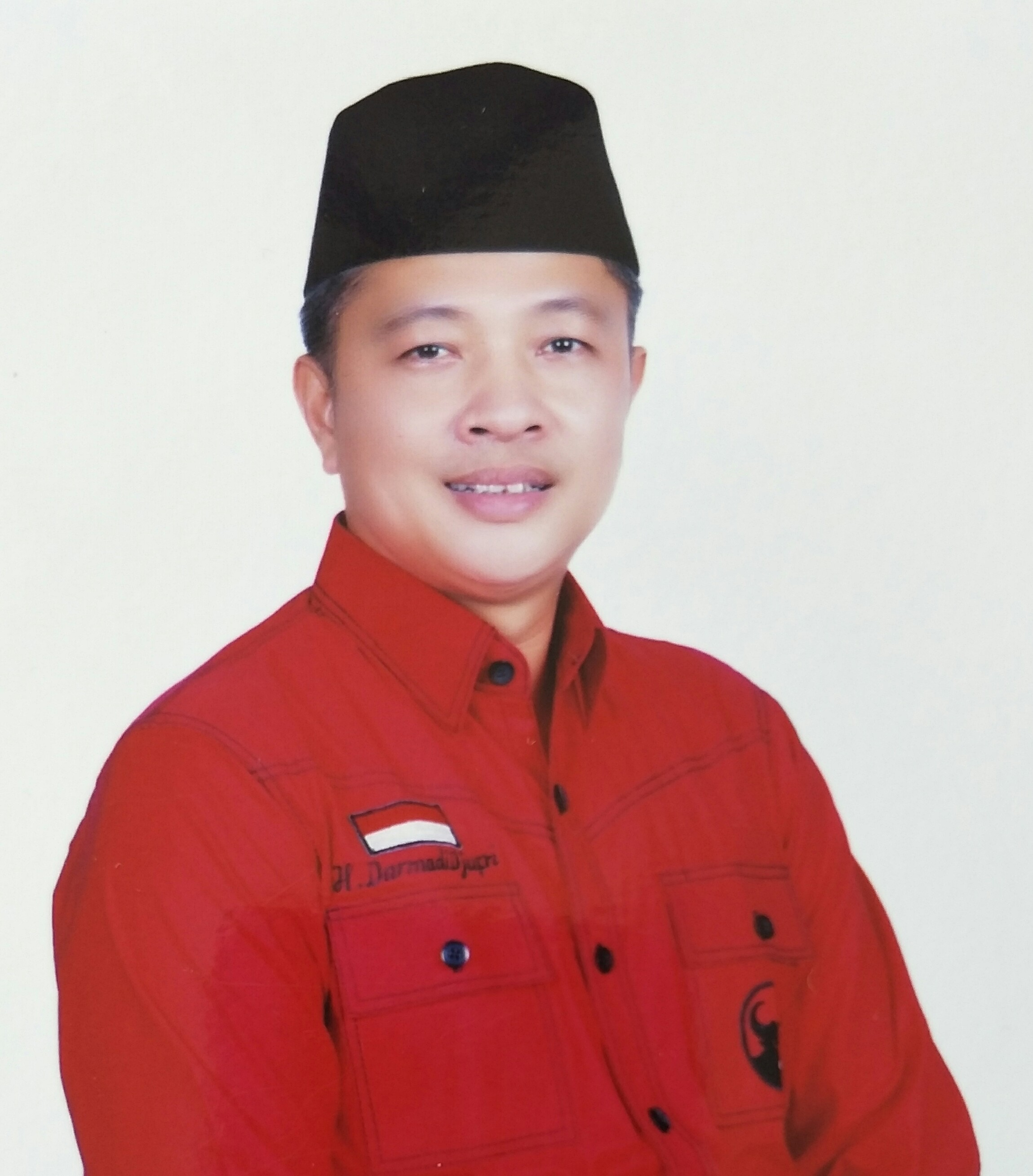 Potret seorang Darmadi Djufri